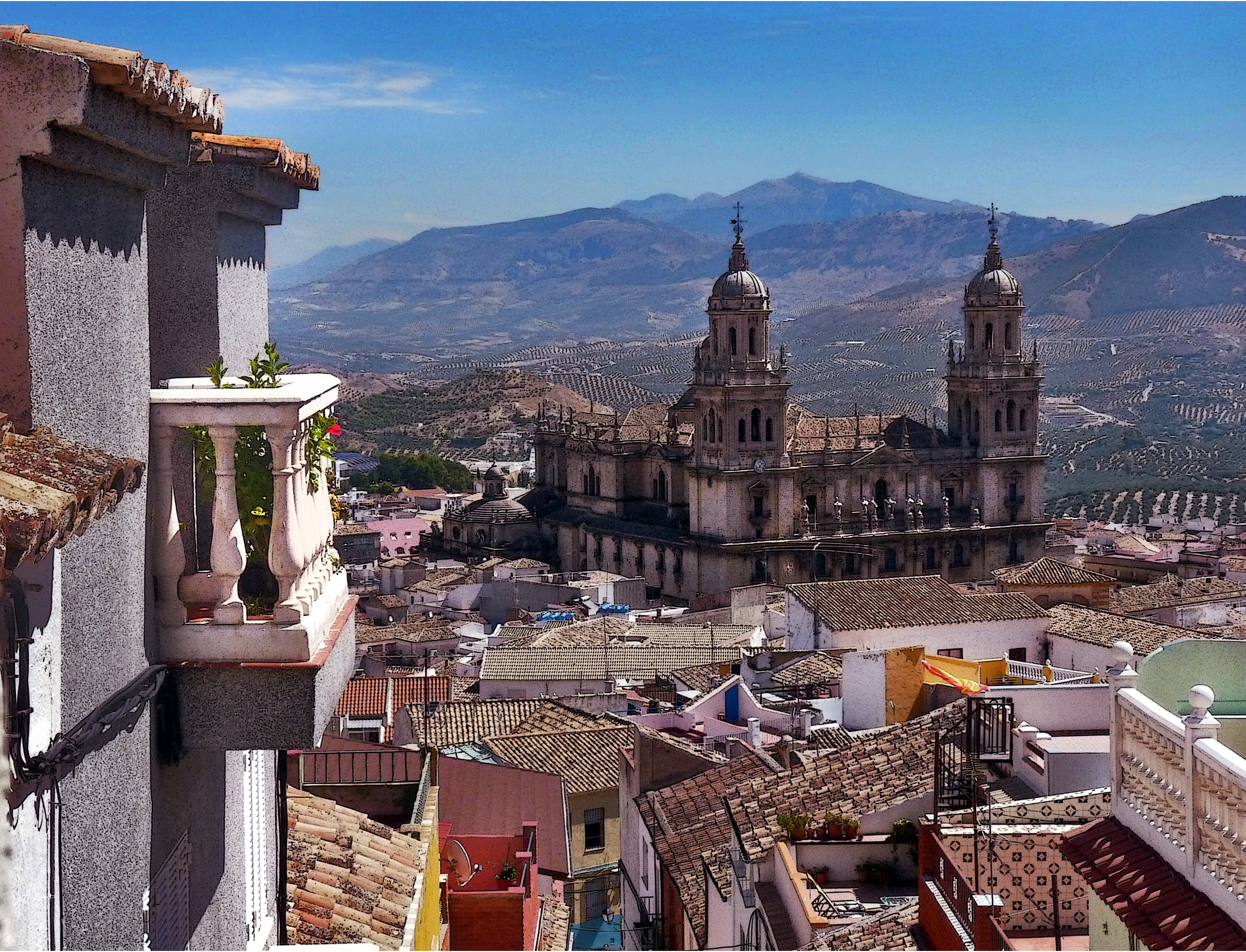 Vista Catedral de Jaén